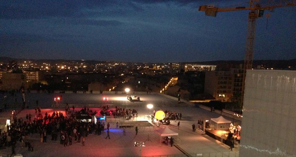 Photo de la terrasse de la Friche lors d'un evenement la nuit